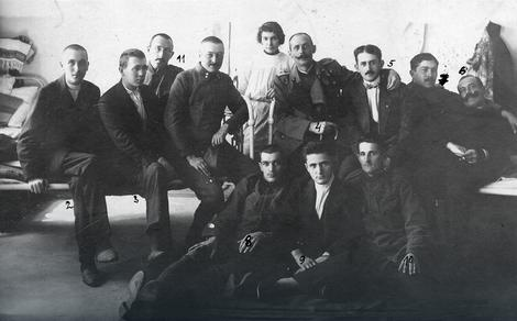 Srpski (latinica): Rekovalescenti posle preležanog tifusa u sobi br.19, Okružne bolnice u Nišu, marta 1915.